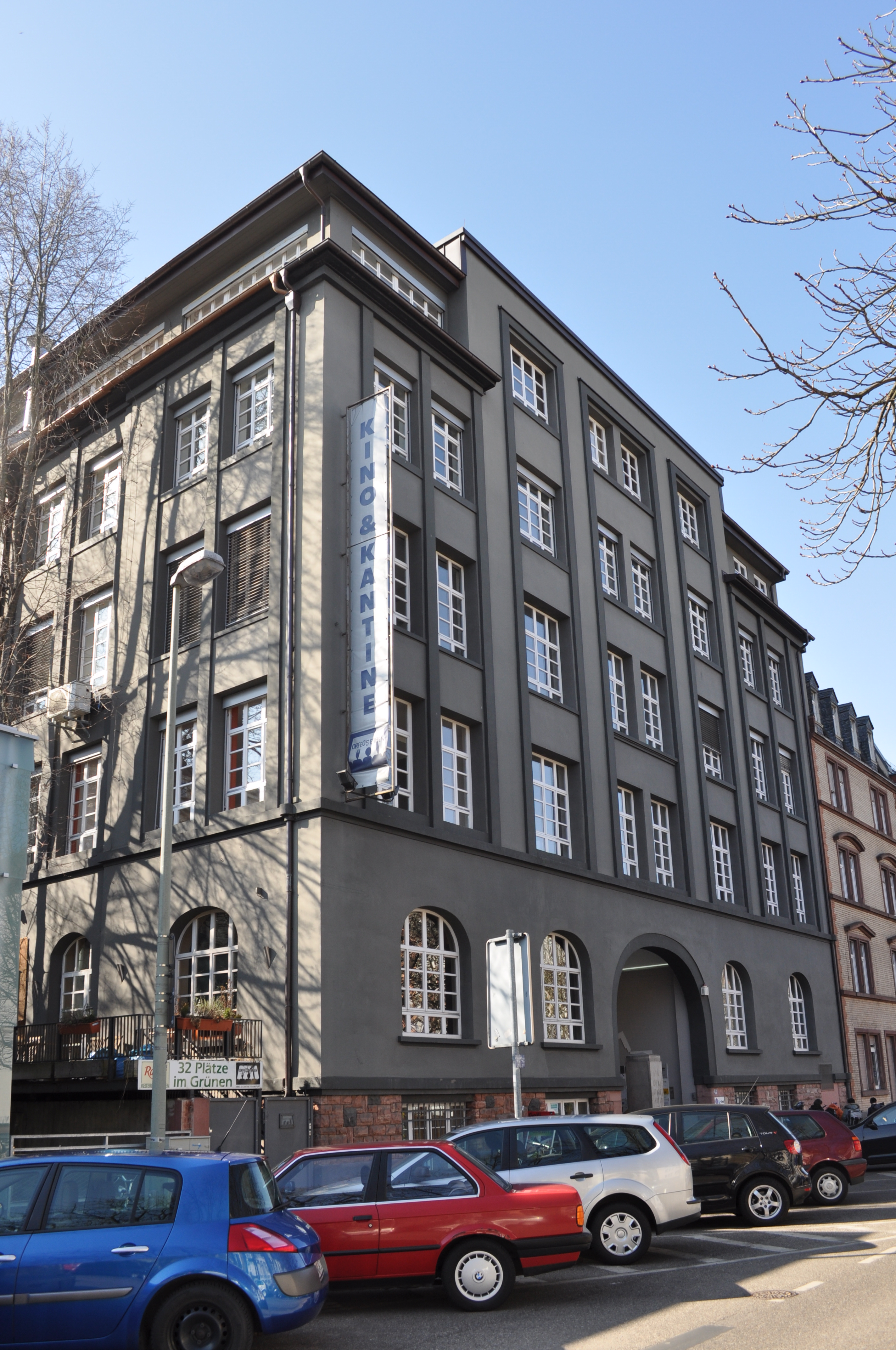 Hamburger Allee 45 in Frankfurt. Ursprünglich Sitz einer bedeutenden typographische Industrie, der Bauersche Gießerei, 1837 in Frankfurt gegründet, seit 1872 in Bockenheim). später Sitz des English Theatre, heute Galli-Theater und des Kinos und Restaurant Orfeos Erben.